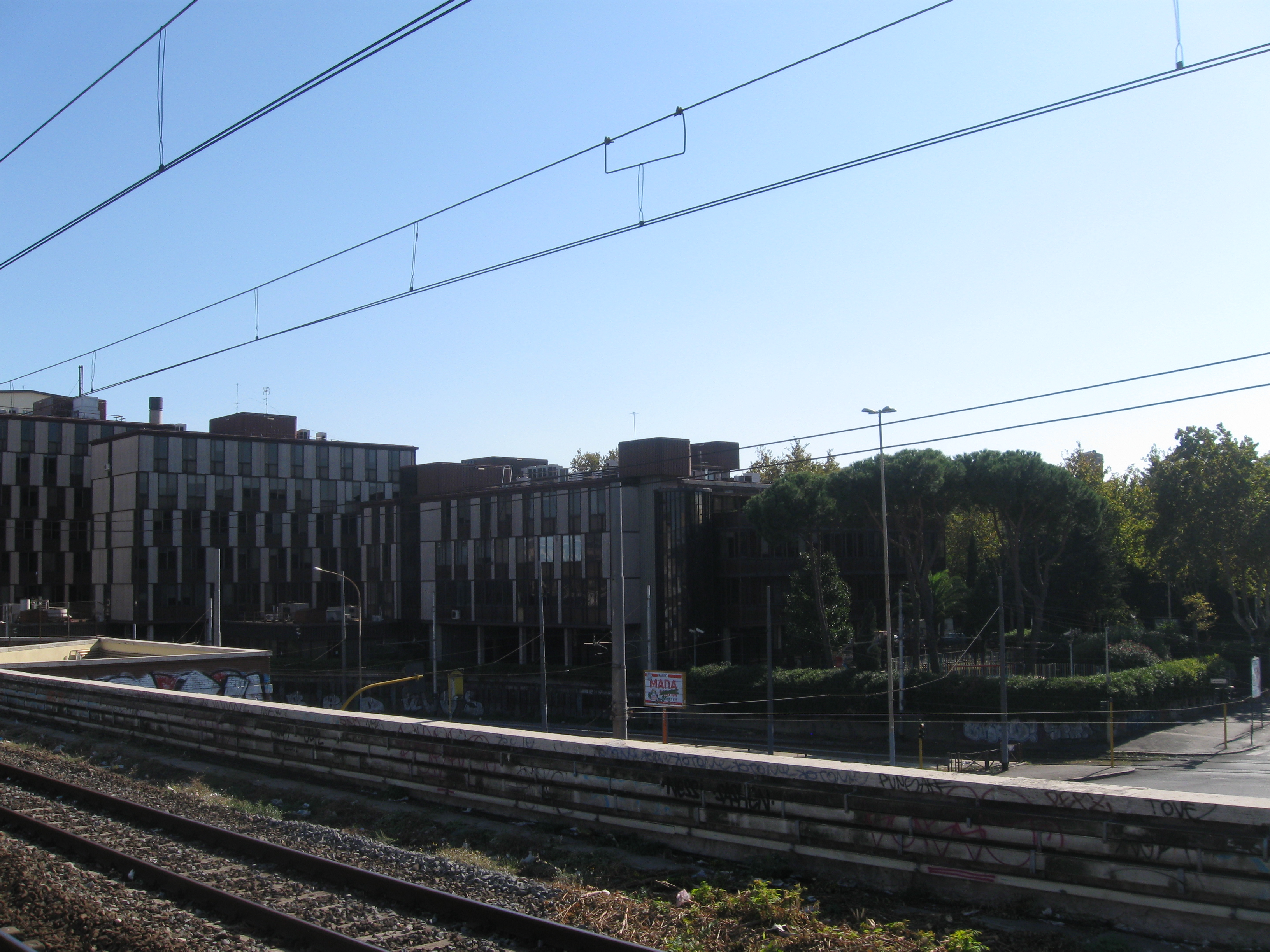 Palazzo delle Pensioni di Piero Maria Lugli a Roma, piazza di Porta Maggiore